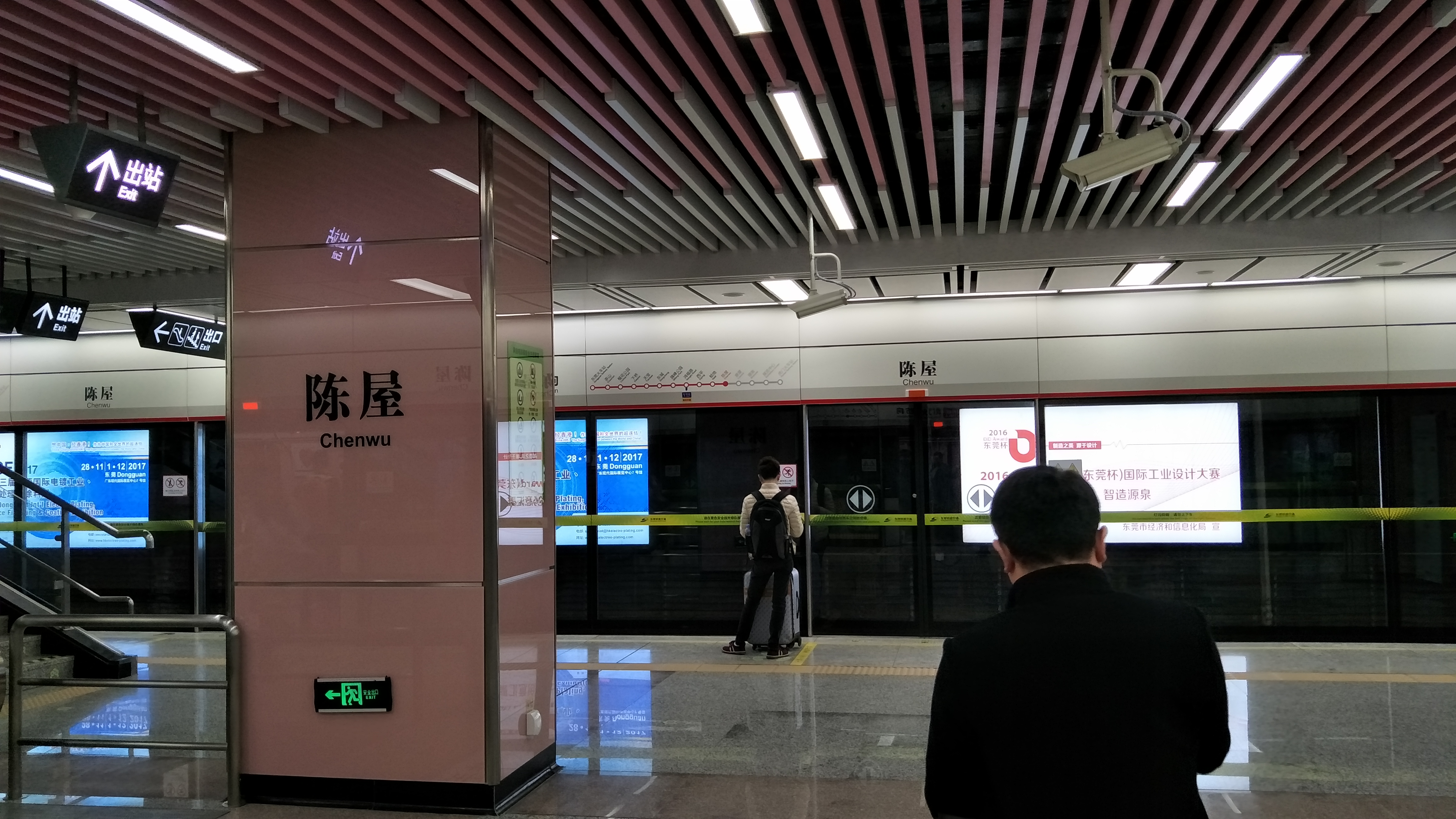 陈屋站月台